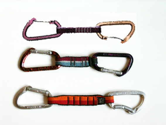 Klimsetjes, bovenaan een setje met draadsnappers